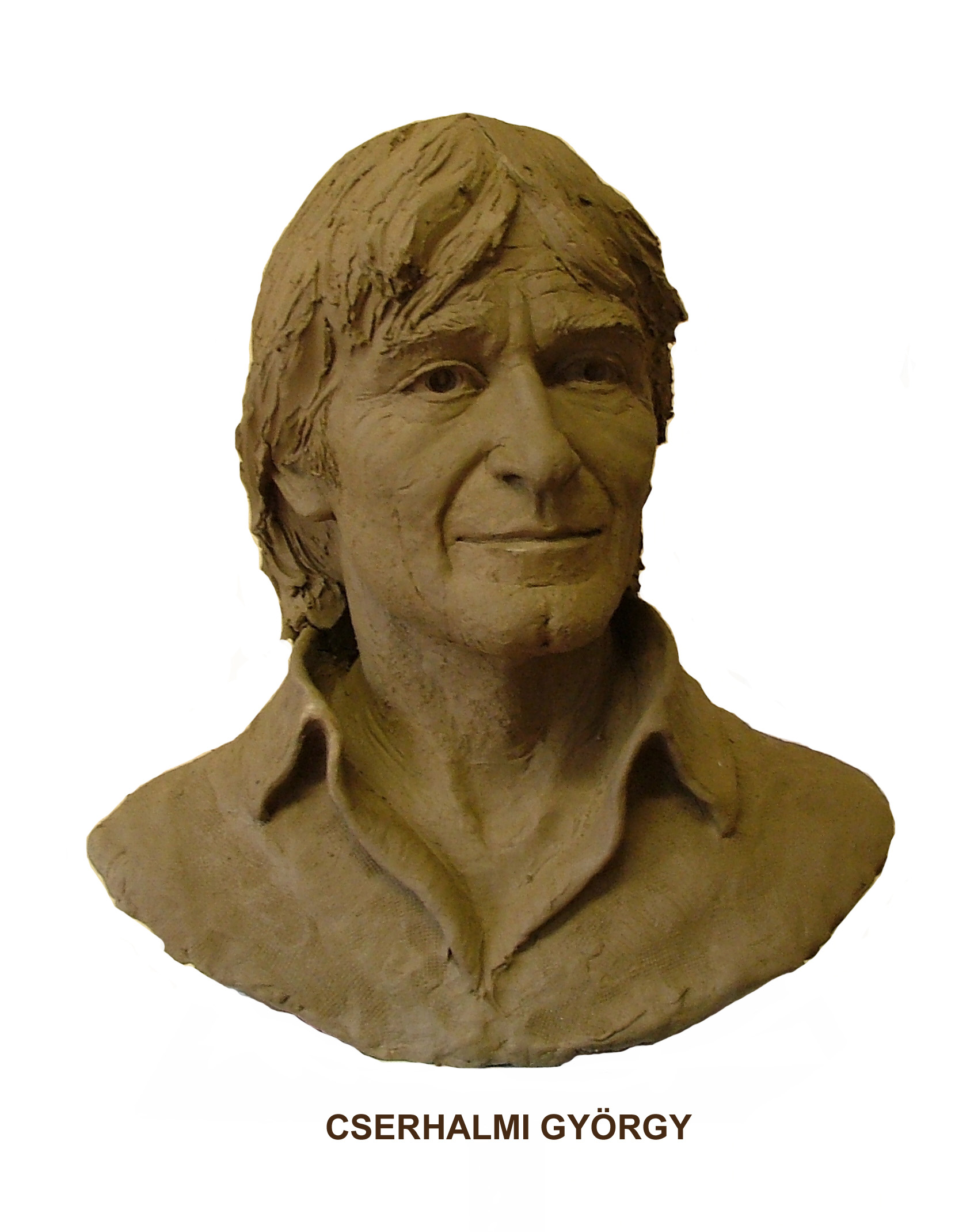 Juha Richárd: Cserhalmi György színművész (terrakotta)